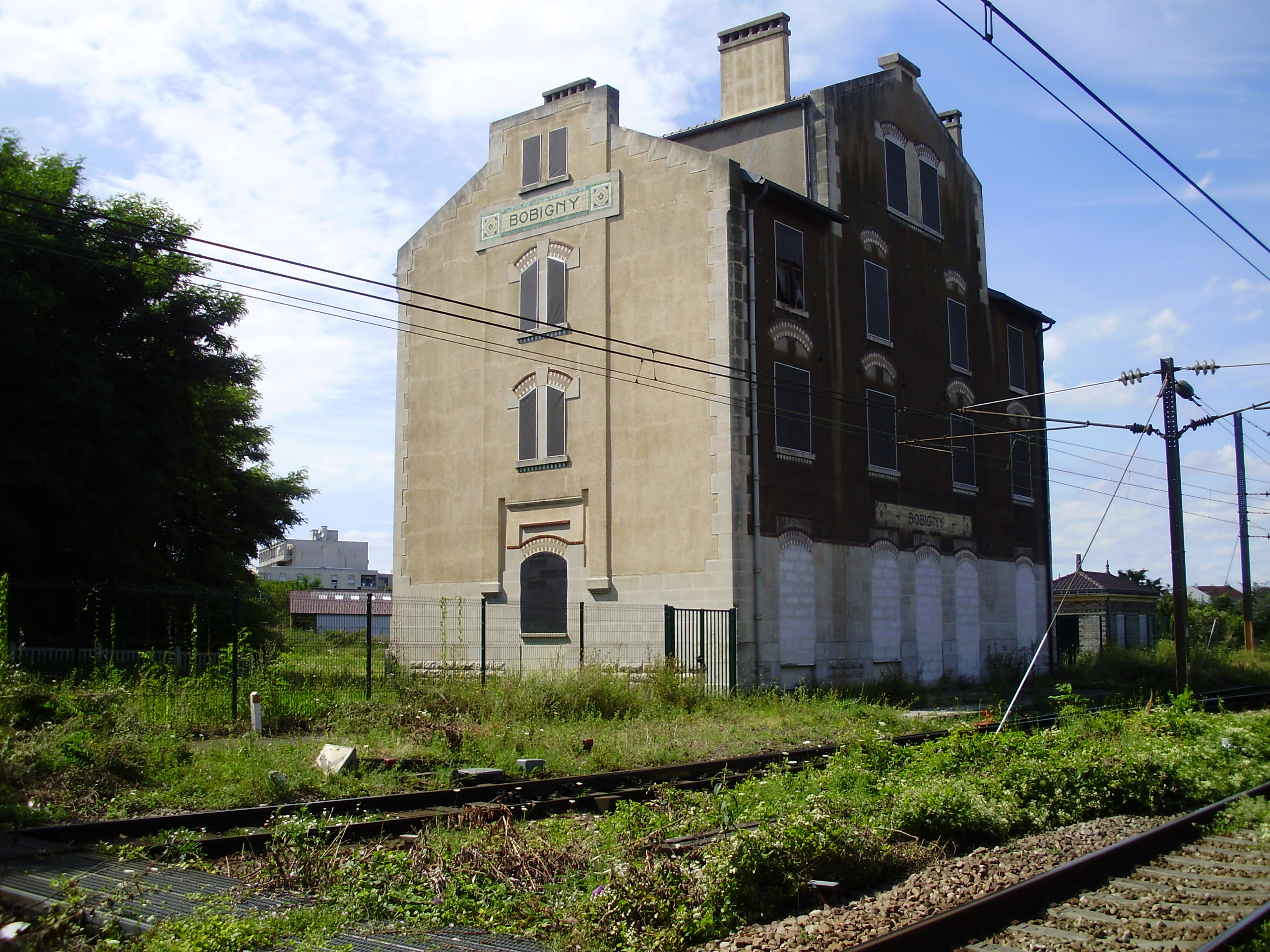 Gare de Bobigny, Seine-Saint-Denis, France : ex-bâtiment voyageurs vu au niveau des voies ferrées, sous le pont routier de l'avenue Henri-Barbusse (D 115).